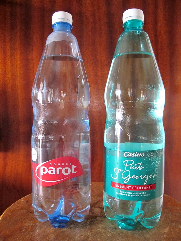 Spécimens de bouteilles de Parot 125 PET et Puy-Saint-Georges 125 PET.